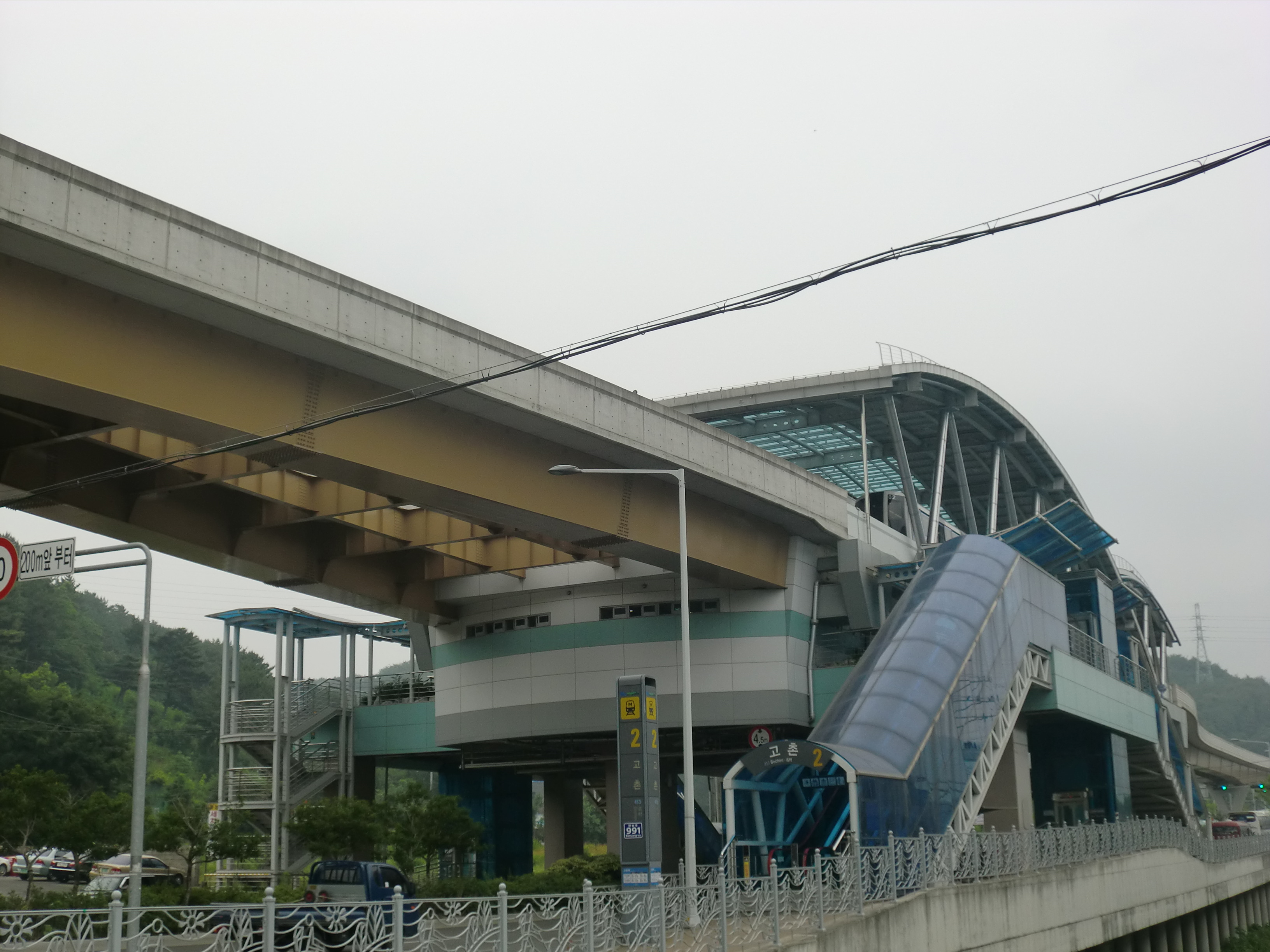 부산도시철도 4호선 고촌역